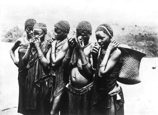 Moyen Congo: Mongoumba, type de femmes badondo.